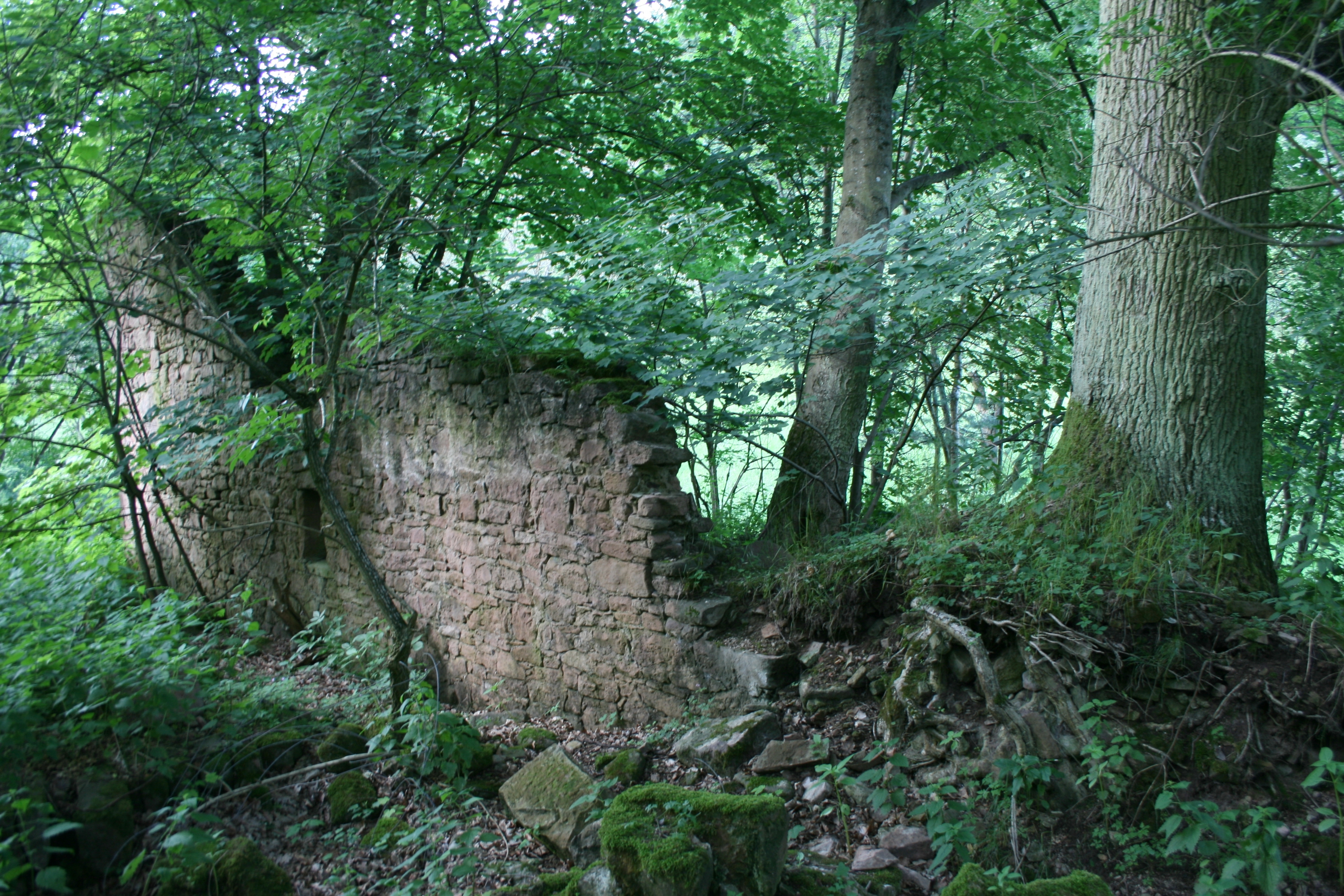 Mühlhäuser Schlößchen bei Breuberg, Odenwald, Hessen. Ansicht des Weiherhauses, erhaltene Mauer an der Westseite. Im Vordergrund Versturz des Schalenturms.